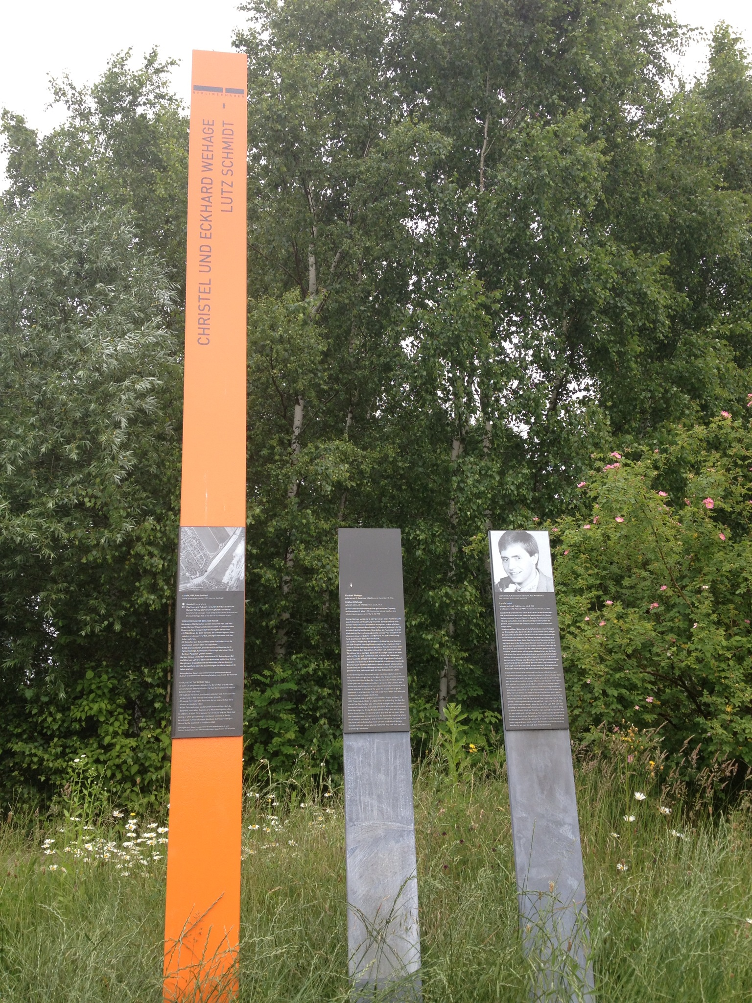 Maueropfer-Gedenkstele Wehage / Schmidt im Landschaftspark Rudow-Altglienicke (Gesamtansicht)